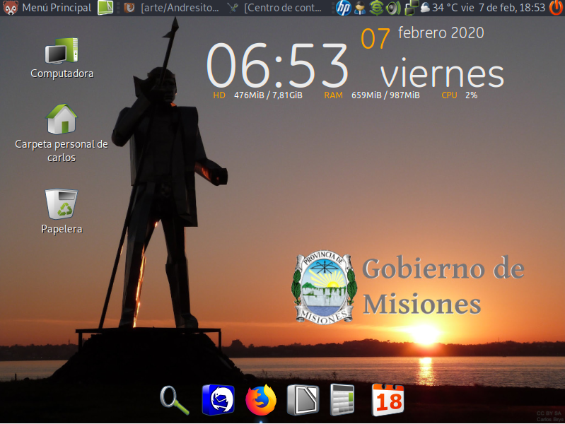 Escritorio de GobMis GNU/Linux